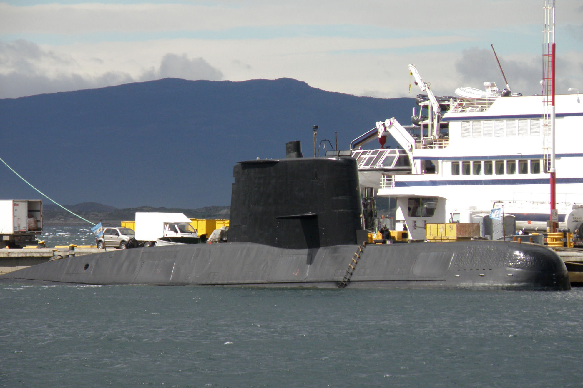 Le ARA Santa Cruz (S-41) à quai à Ushuaia